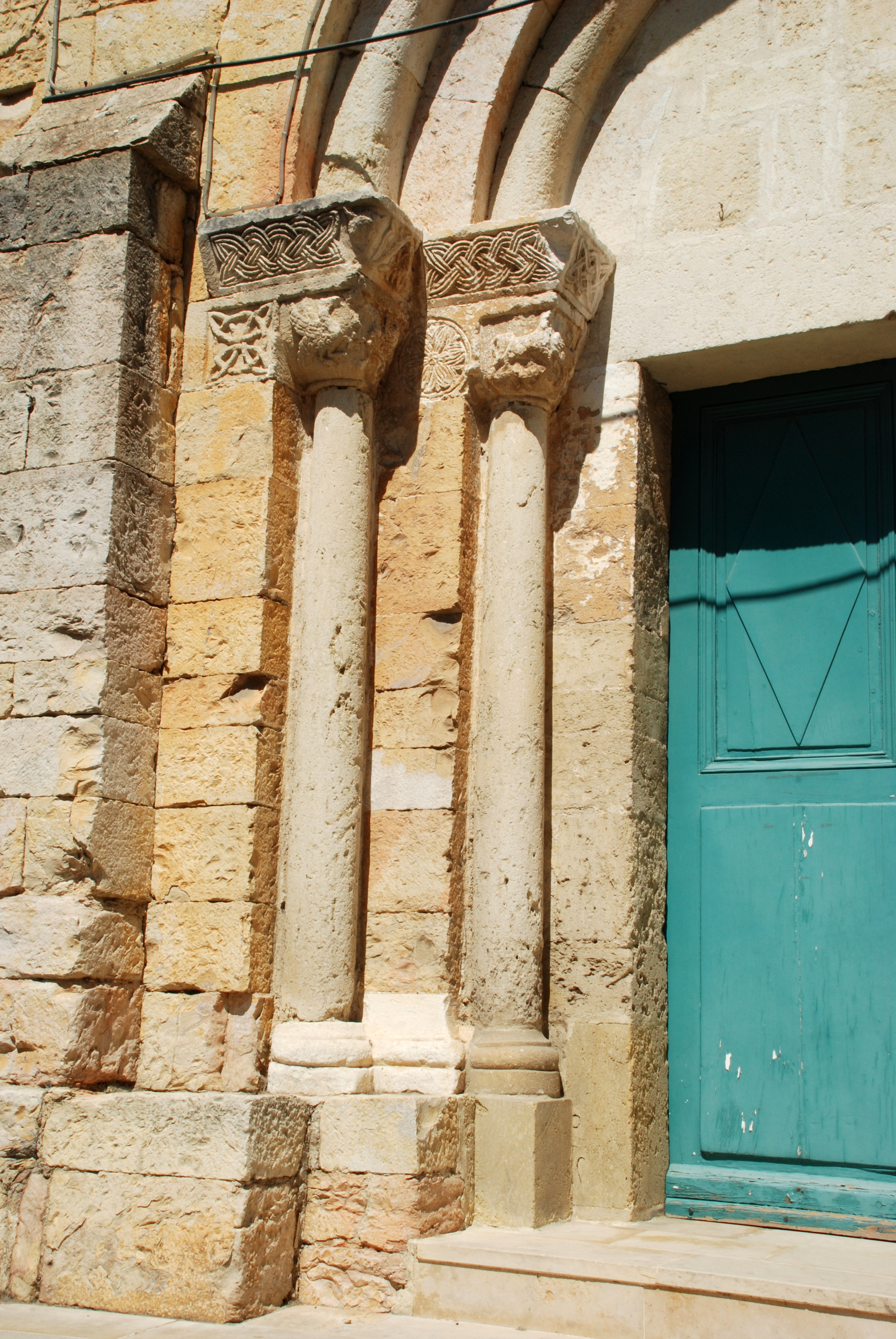 France - Gard - Église Saint-André de Bernis